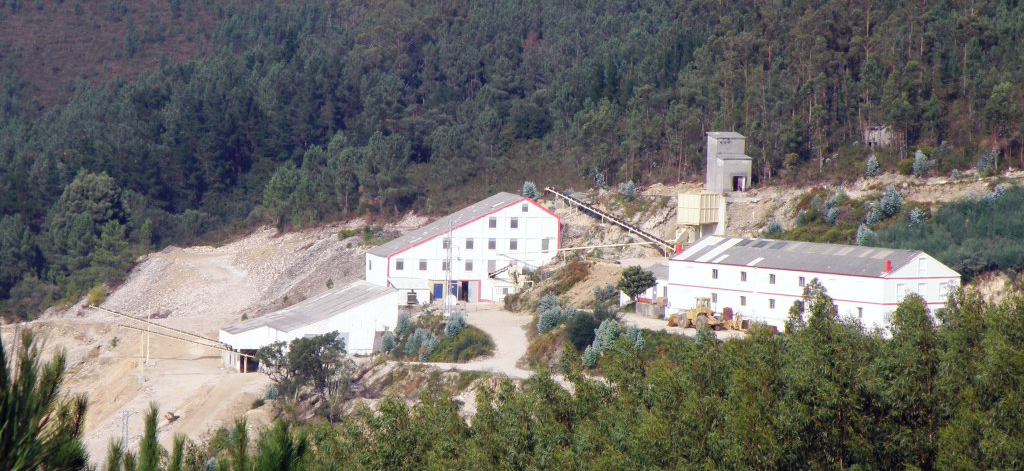 Areeira das das minas de San Finx, Lousame